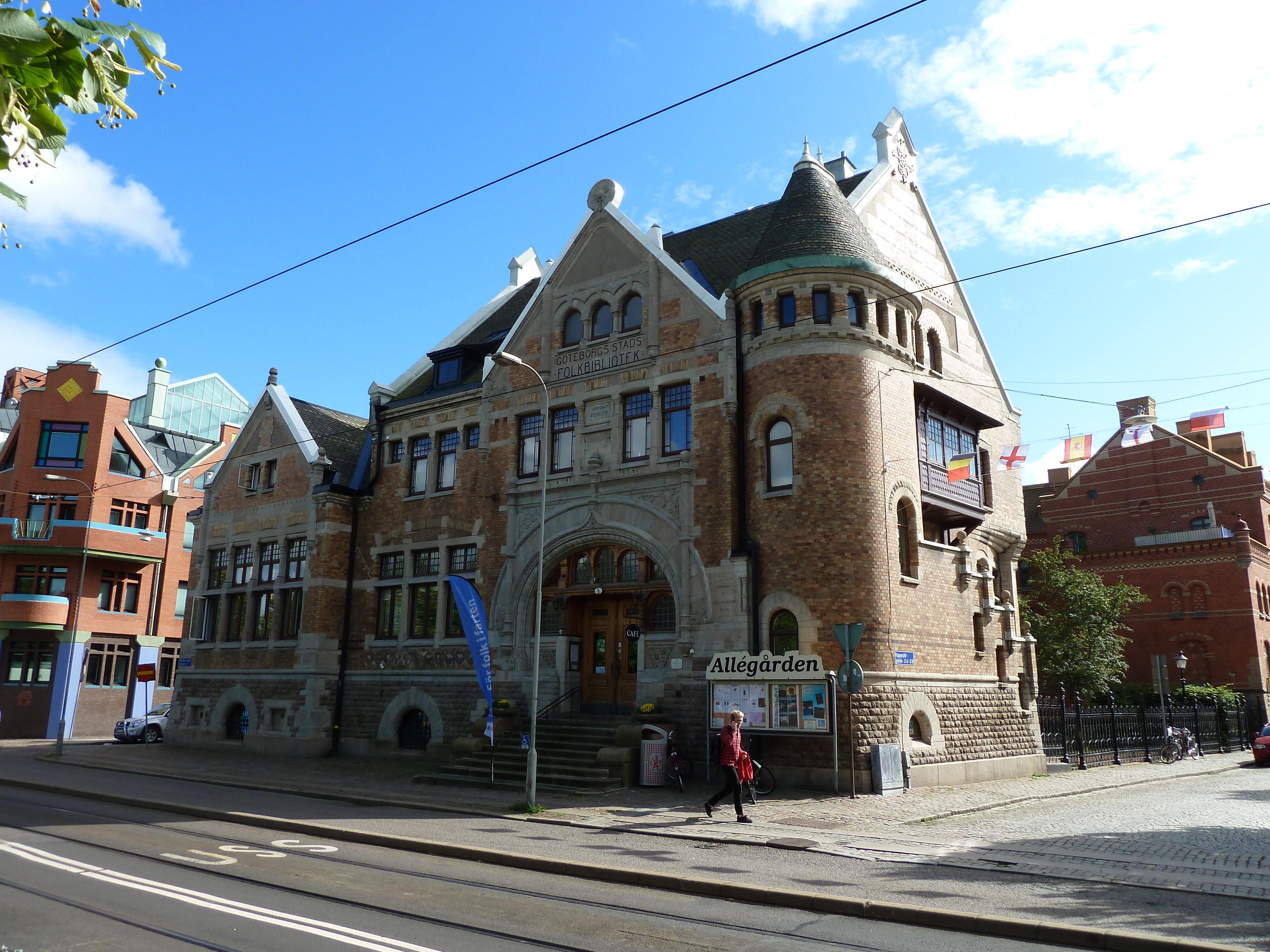 Biblioteca comunale Goteborg